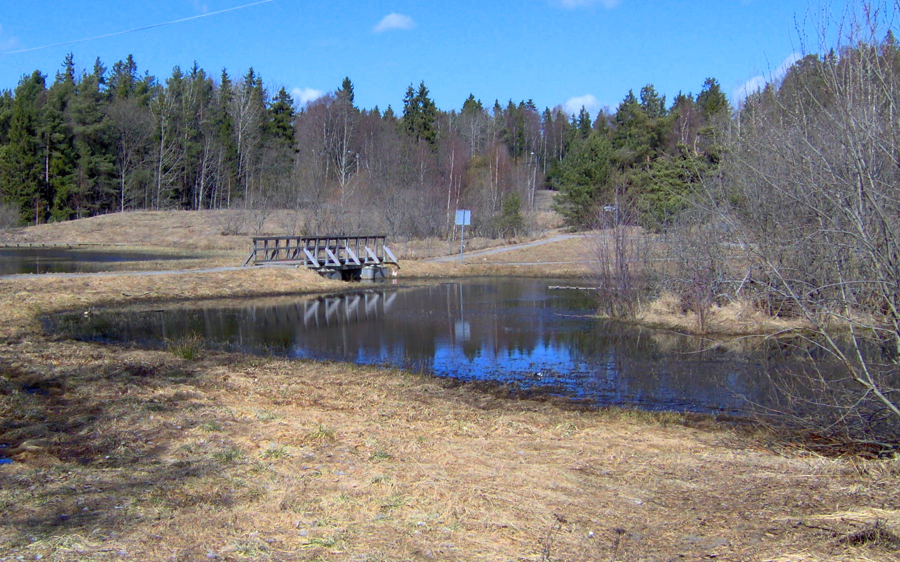 Fullerstaåns Översilningsanläggning vid Källbrinksskolan, Huddinge, Södra Storstockholm våren 2006